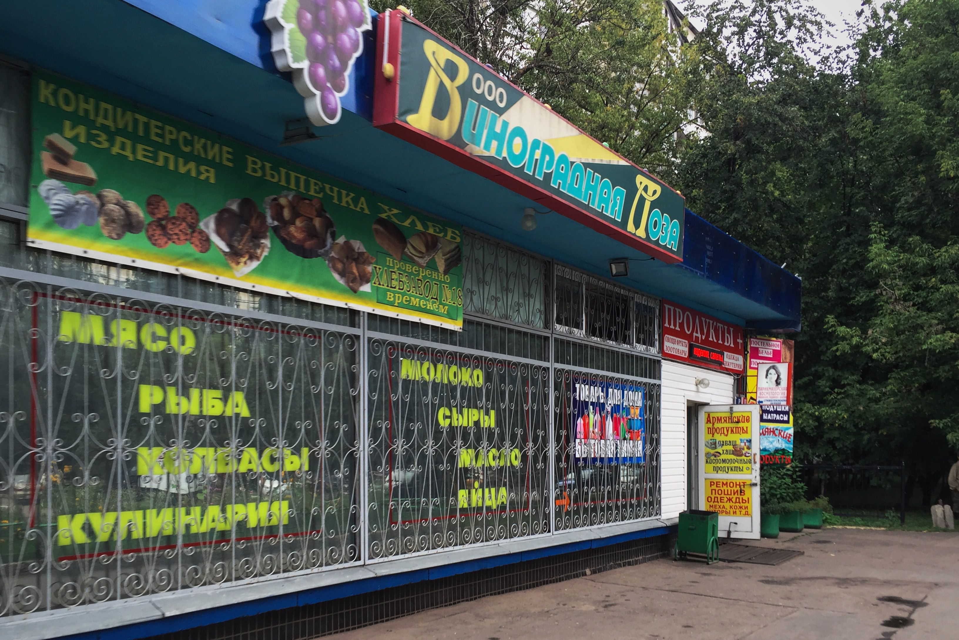 Дегунинский проезд. Магазины в здании по Дубнинской 12 к.2